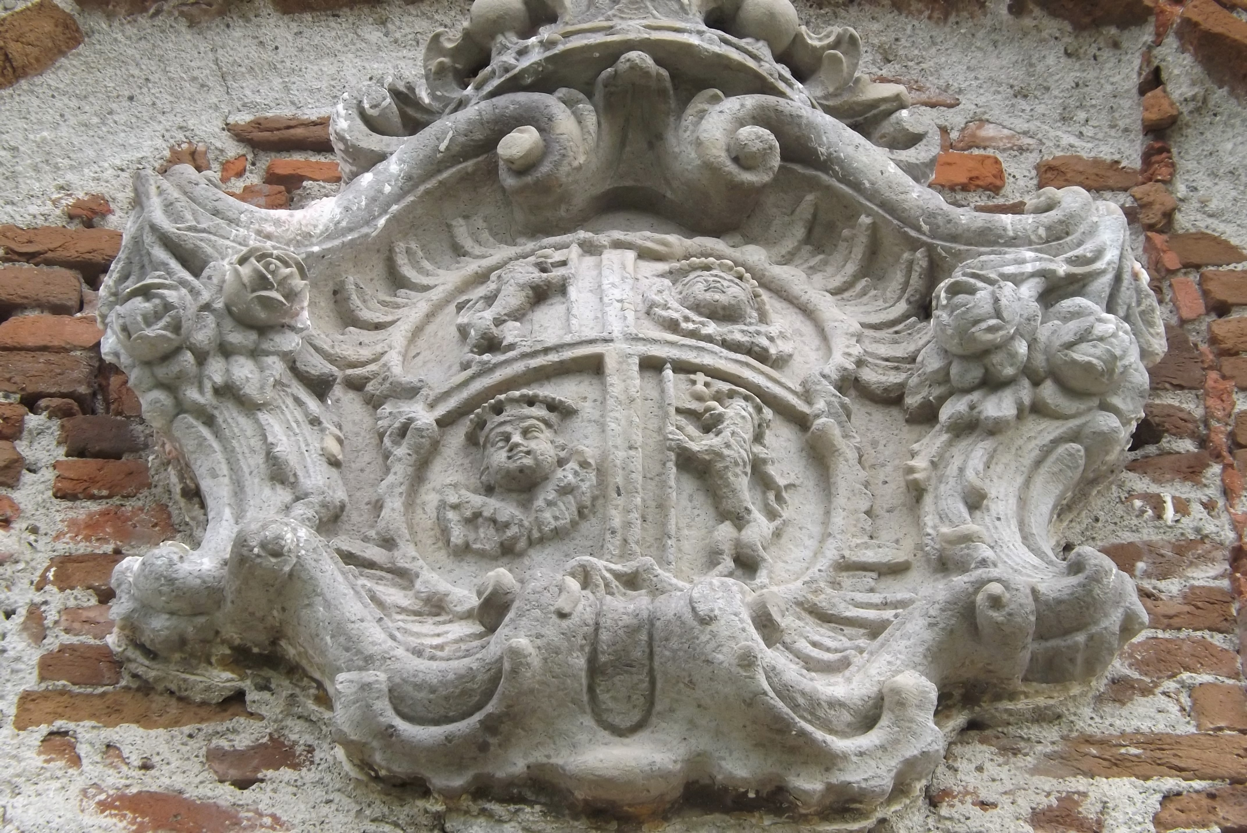 A Barkóczyak címere a pusztaszikszói templom homlokzatán